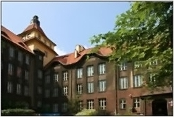 Budynek Wydziału Biologii i Ochrony Środowiska Uniwersytetu Śląskiego, ul. Jagiellońska 28, Katowice